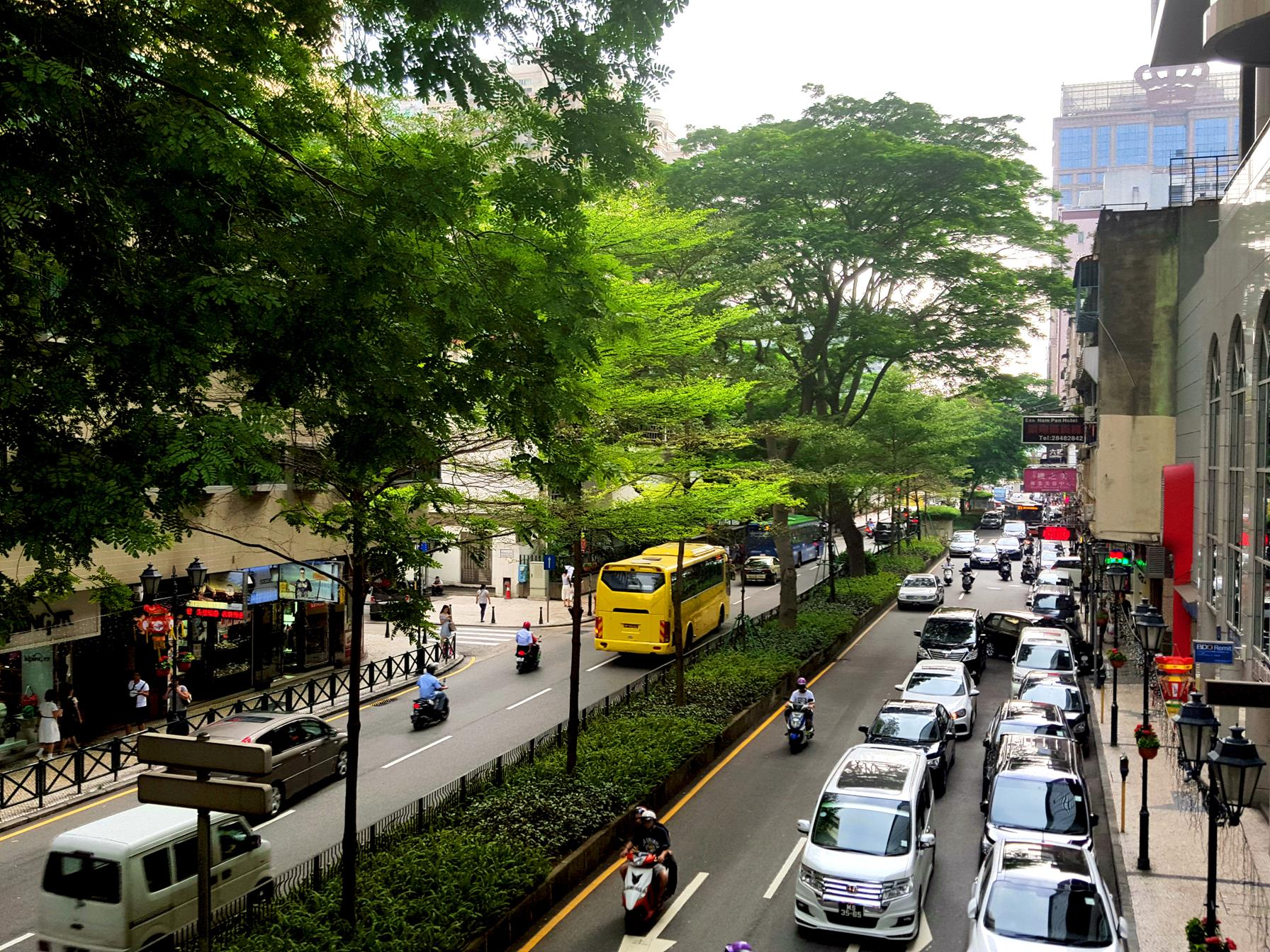 Avenida de D. João IV